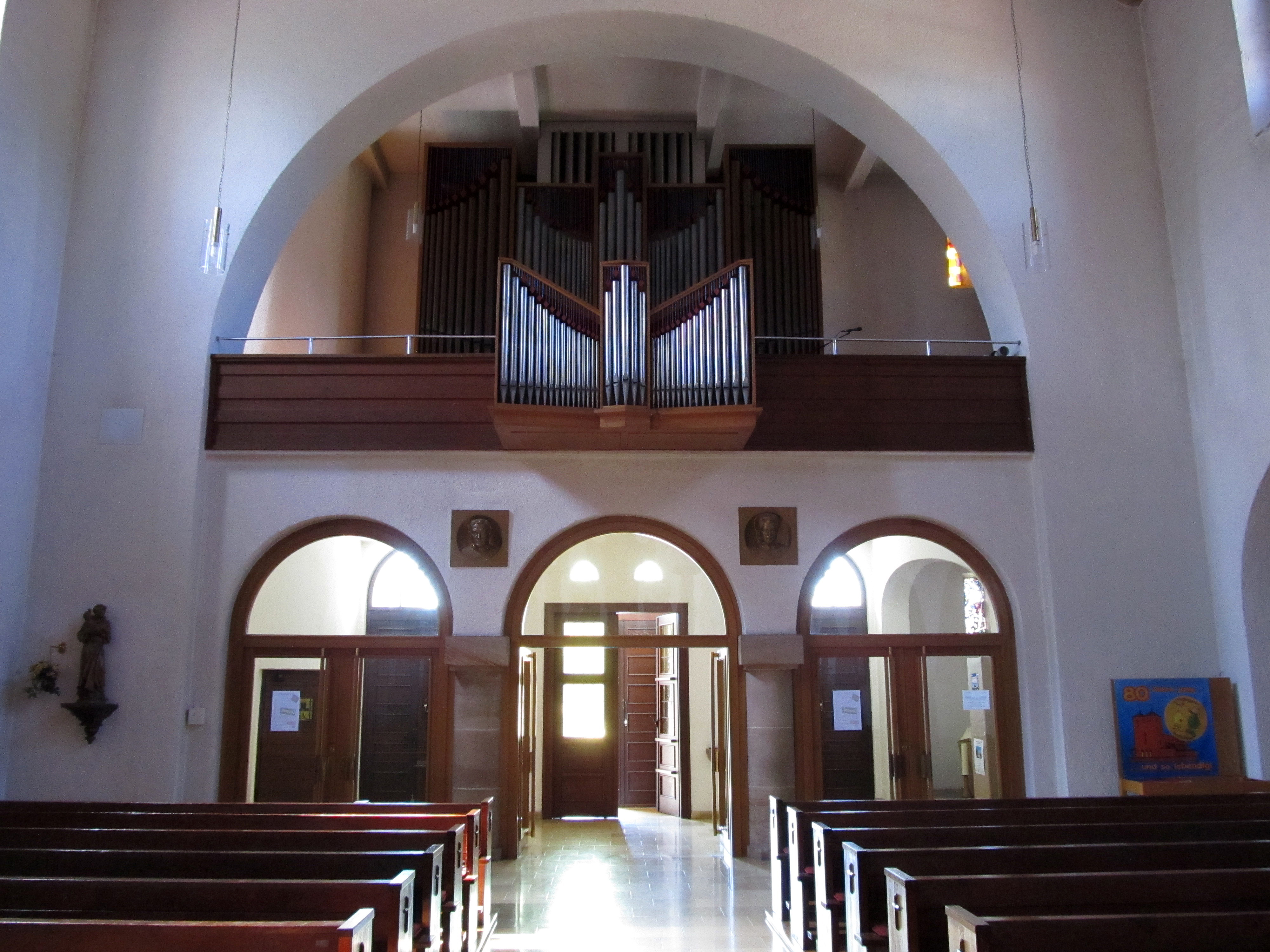 Orgelempore der katholischen Pfarrkirche St. Joseph in Waldfischbach-Burgalben, Kreis Südwestpfalz, Rheinland-Pfalz